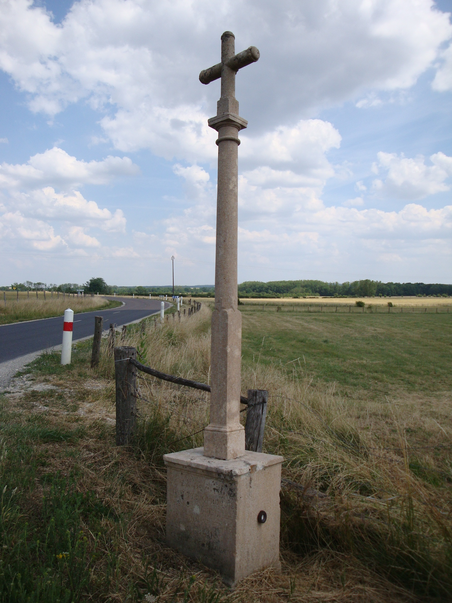 Croix de Verseilles-le-Bas:Croix de Baissey